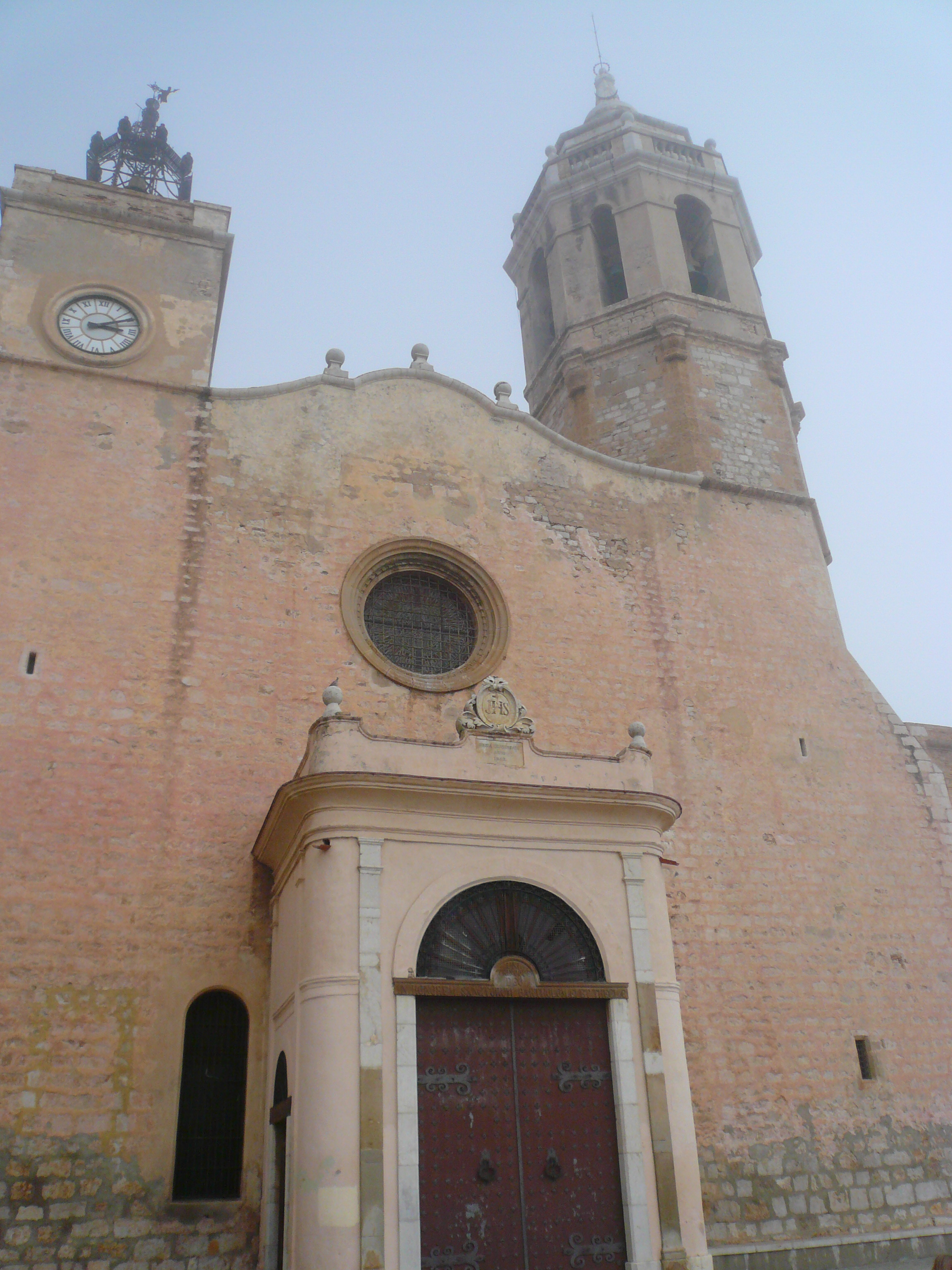 Església parroquial de Sant Bartomeu i Santa Tecla (Sitges) Object location41° 14′ 04.82″ N, 1° 48′ 41.48″ E